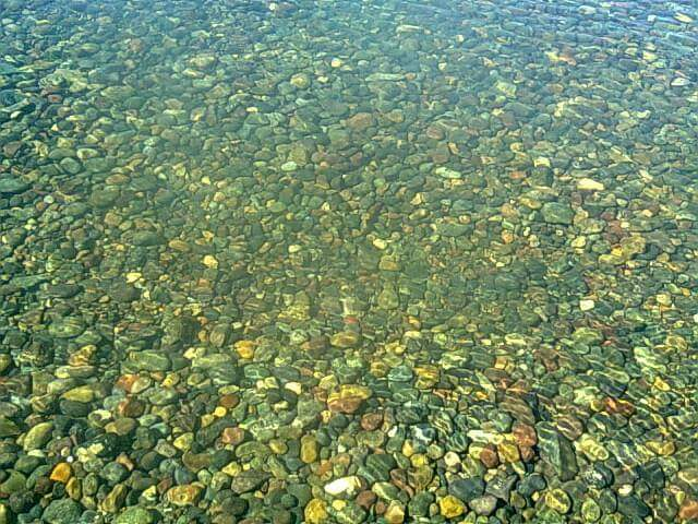 Fondo de la orilla del Lago Pellegrini